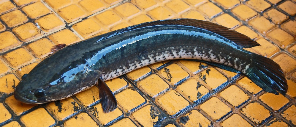 Snakehead murrel, Channa striata. From Banyumas, Central Java, Indonesia